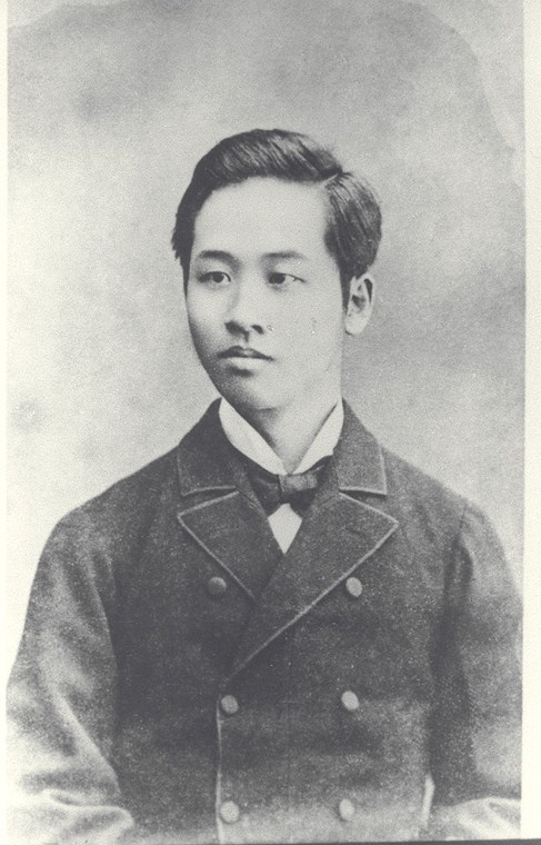 中上川彦次郎（安政1年(1854)8月13日生、明治34年(1901)10月7日没）明治2年(1869)5月8日慶應義塾入塾。明治7年(1874)英国留学、外務権大書記、公信局長、山陽鉄道社長、明治24年(1891)11月から死去まで慶應義塾評議員、三井銀行理事、母は福沢諭吉の姉於婉。